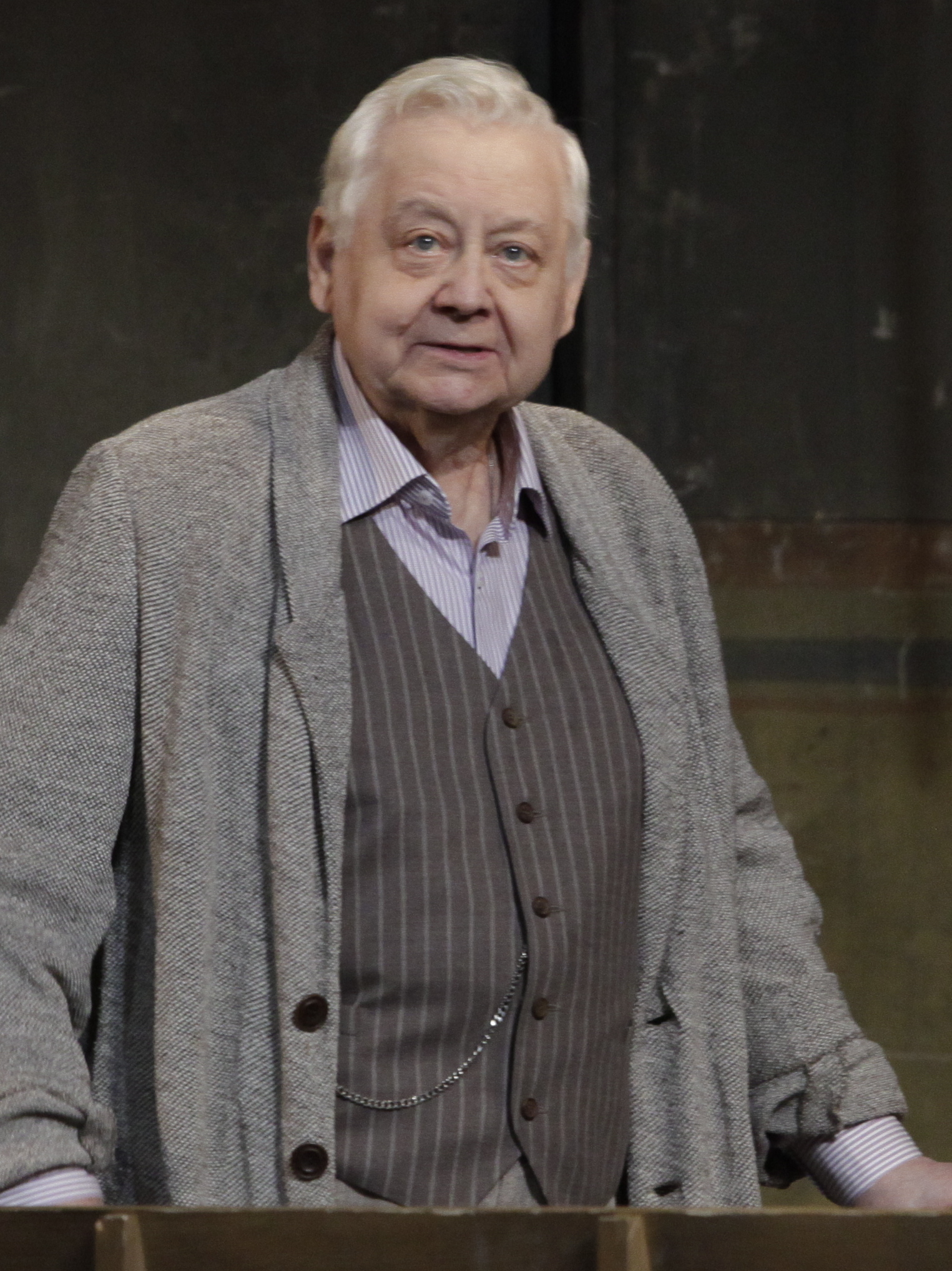 Народный артист СССР Олег Павлович Табаков в роли доктора Евгения Сергеевича Дорна в комедии «Чайка». Московский Театр Студия п/р Олега Табакова.